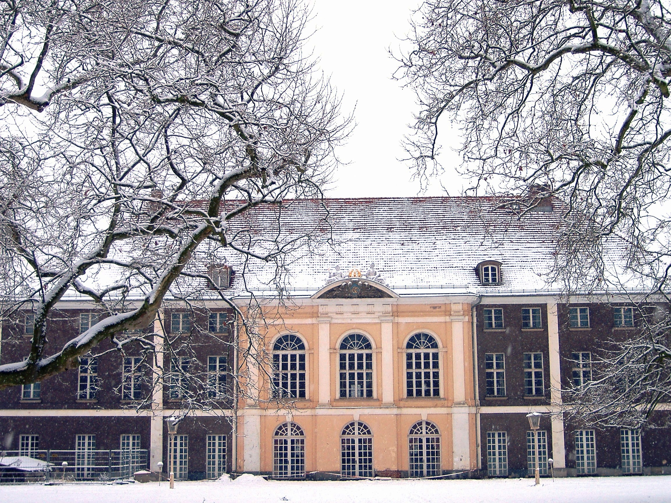 Schloss Schönhausen mit renovierter Supraporte, Blick von der Gartenseite, Winter 2005